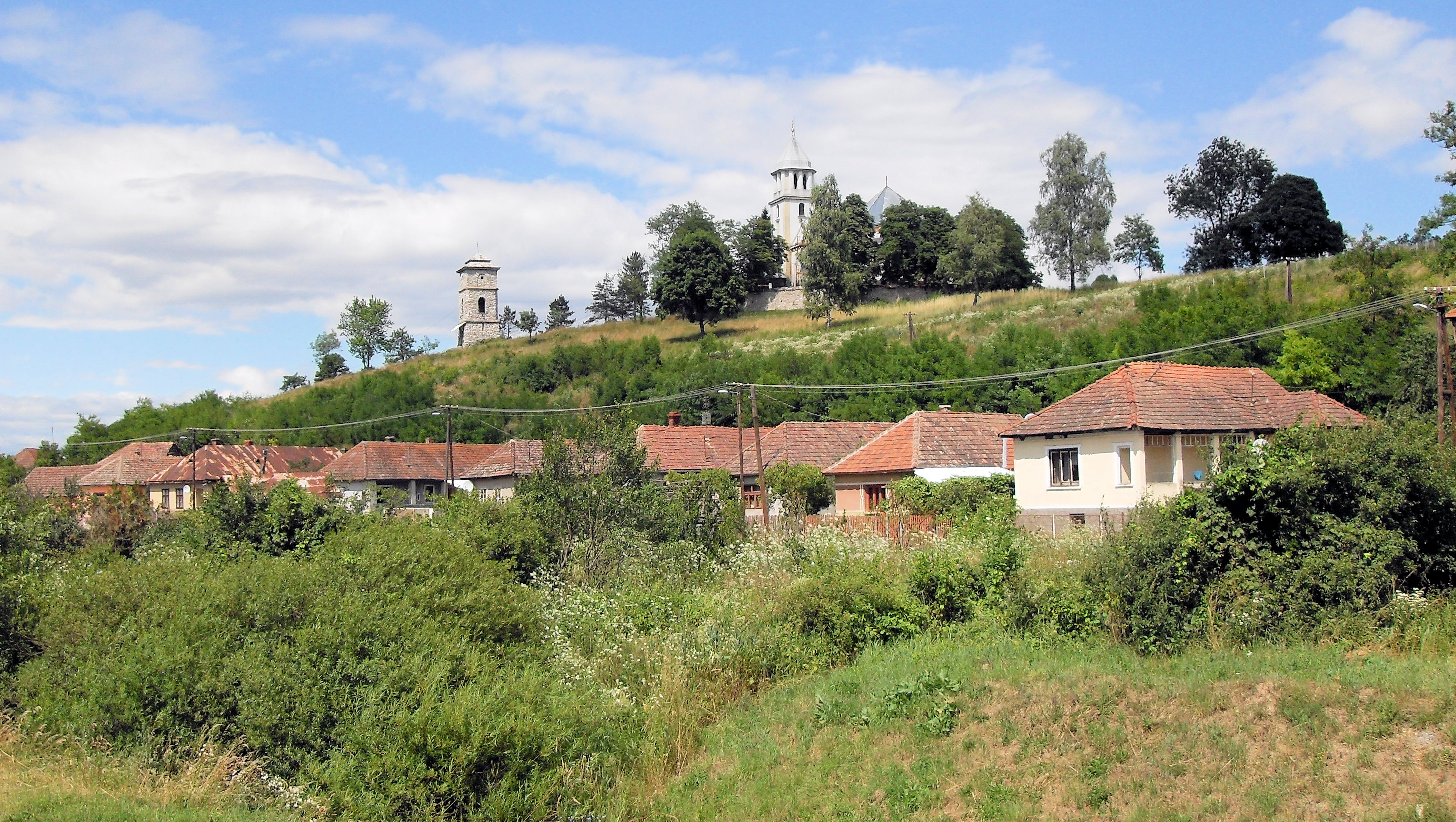 Rakaca délnyugat felől nézve